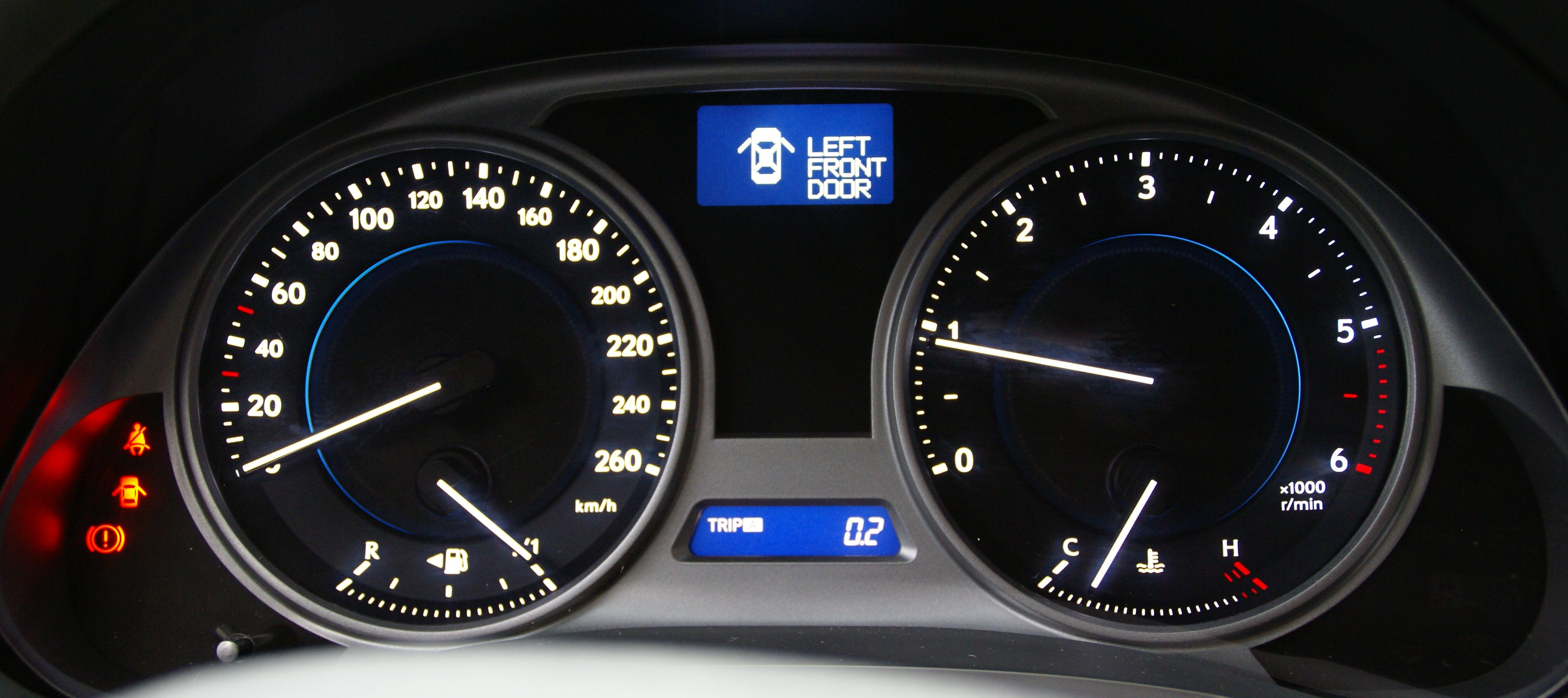 Lexus IS220d vue du tableau de bord